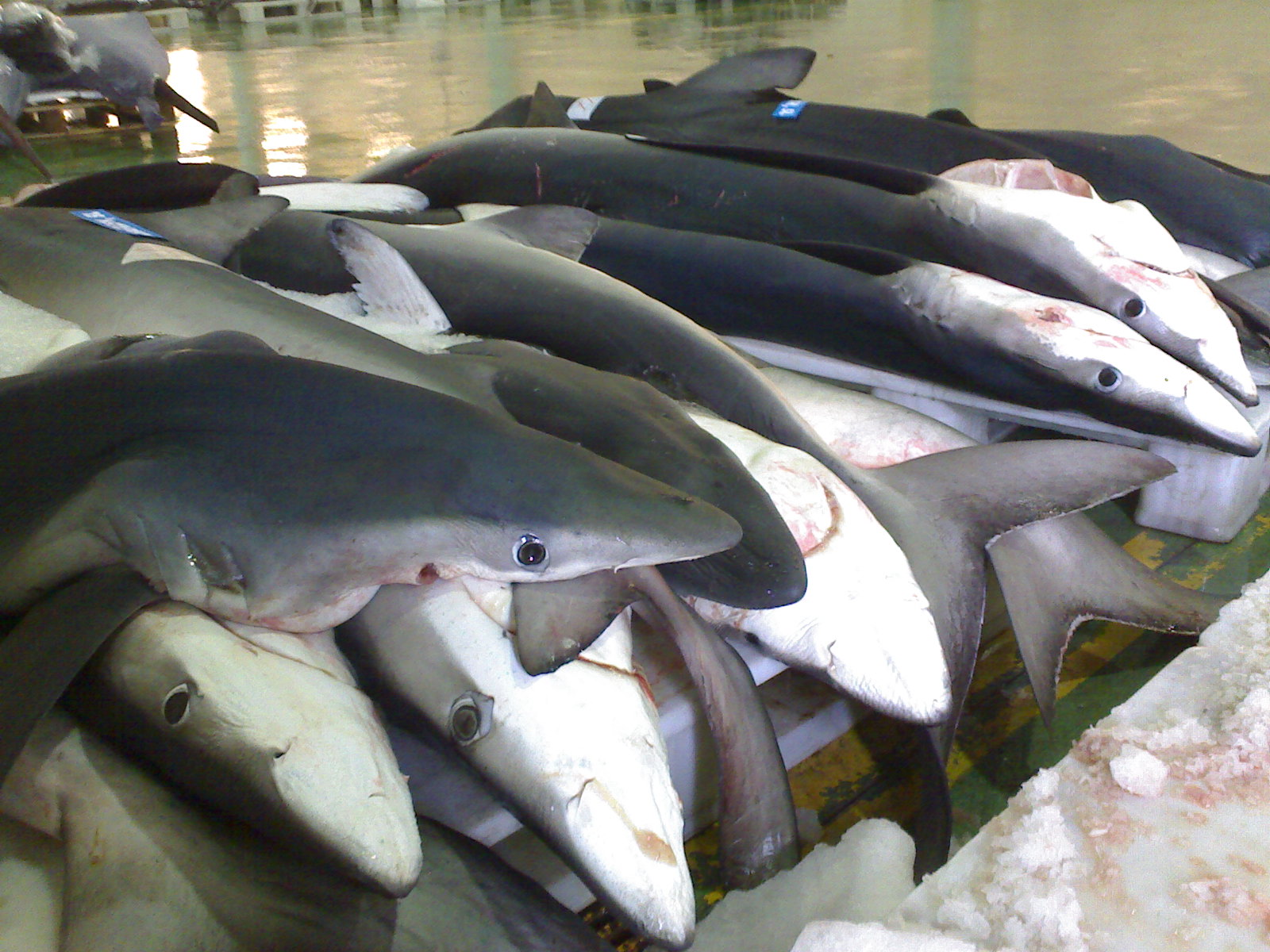 Poxa de quenlla ou tiburón azul (Prionace glauca) no porto pesqueiro de Vigo.